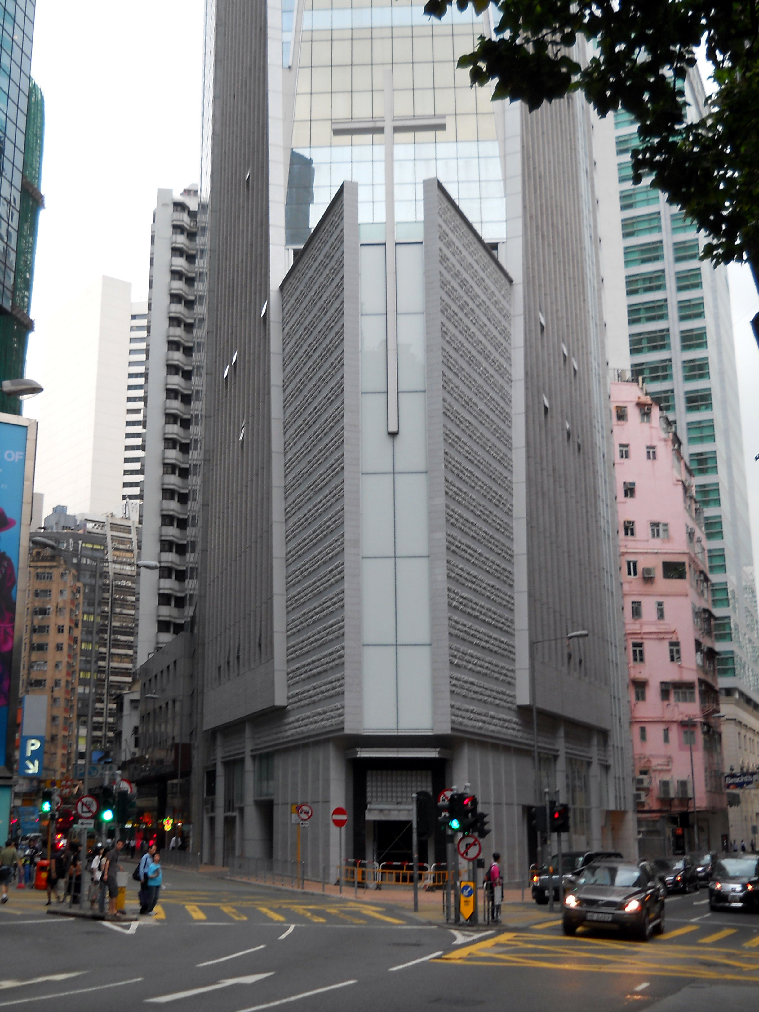 中文（香港）: 中華基督教會公理堂